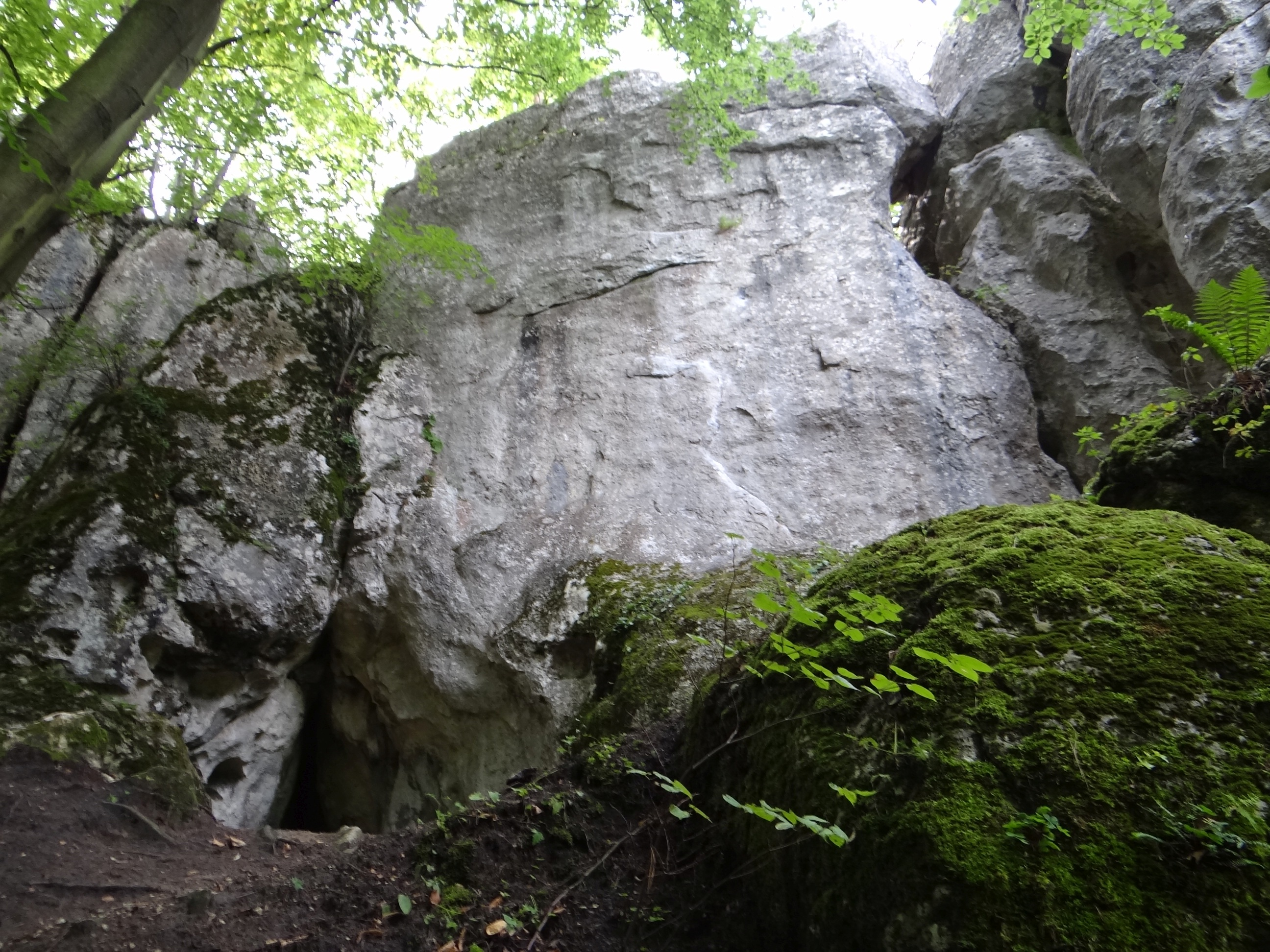 Jaskinia Deszczowa (po lewej)i Schronisko w Krużganku (po prawej) w skałach Góry Popielowej na Wyżynie Częstochowskiej